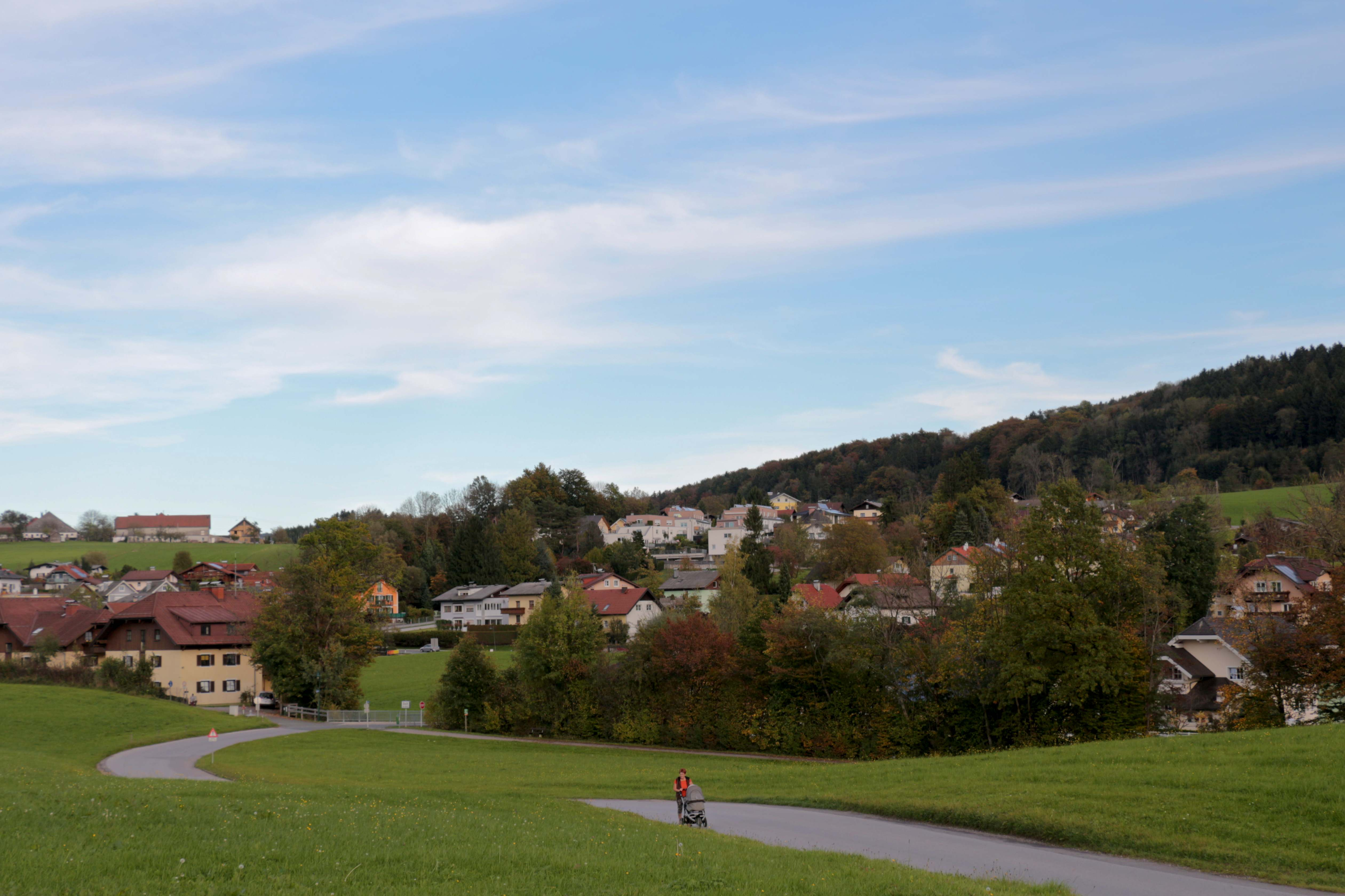 Die Ortschaft Esch (Hallwanger Anteil) - Blick von Zilling im Nordwesten